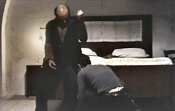 Screenshot del film Padre padrone (1977) diretto da Paolo e Vittorio Taviani